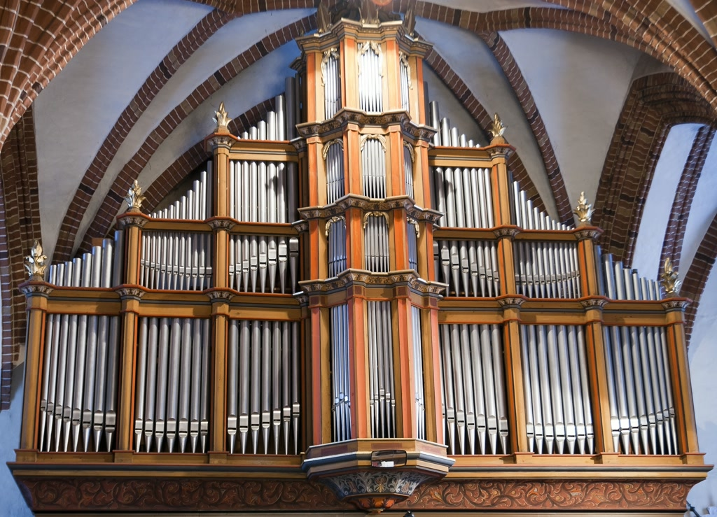 sulechów